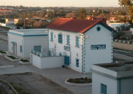 Kalaa Kebira La Gare